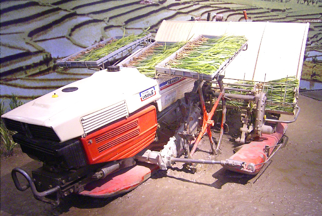 Setzmaschine Typ YANMAR YP 400 von Yamaha. Das Gerät gleitet von zwei seitlichen Paddelrädern getrieben auf drei Kunststoffschwimmkörpern über den Schlamm und drückt die Reissetzlinge in vier Reihen etwa 20 cm tief ein. Die führende Person schreitet zwischen den Reihen hinter dem Gerät her und steuert wie bei einem Motorrad über Bedienelemente am Lenker Geschwindigkeit und Funktionen der Setzmaschine. Aufgenommen als Teil der Sonderausstellung "Asien" im Überseemuseum Bremen.